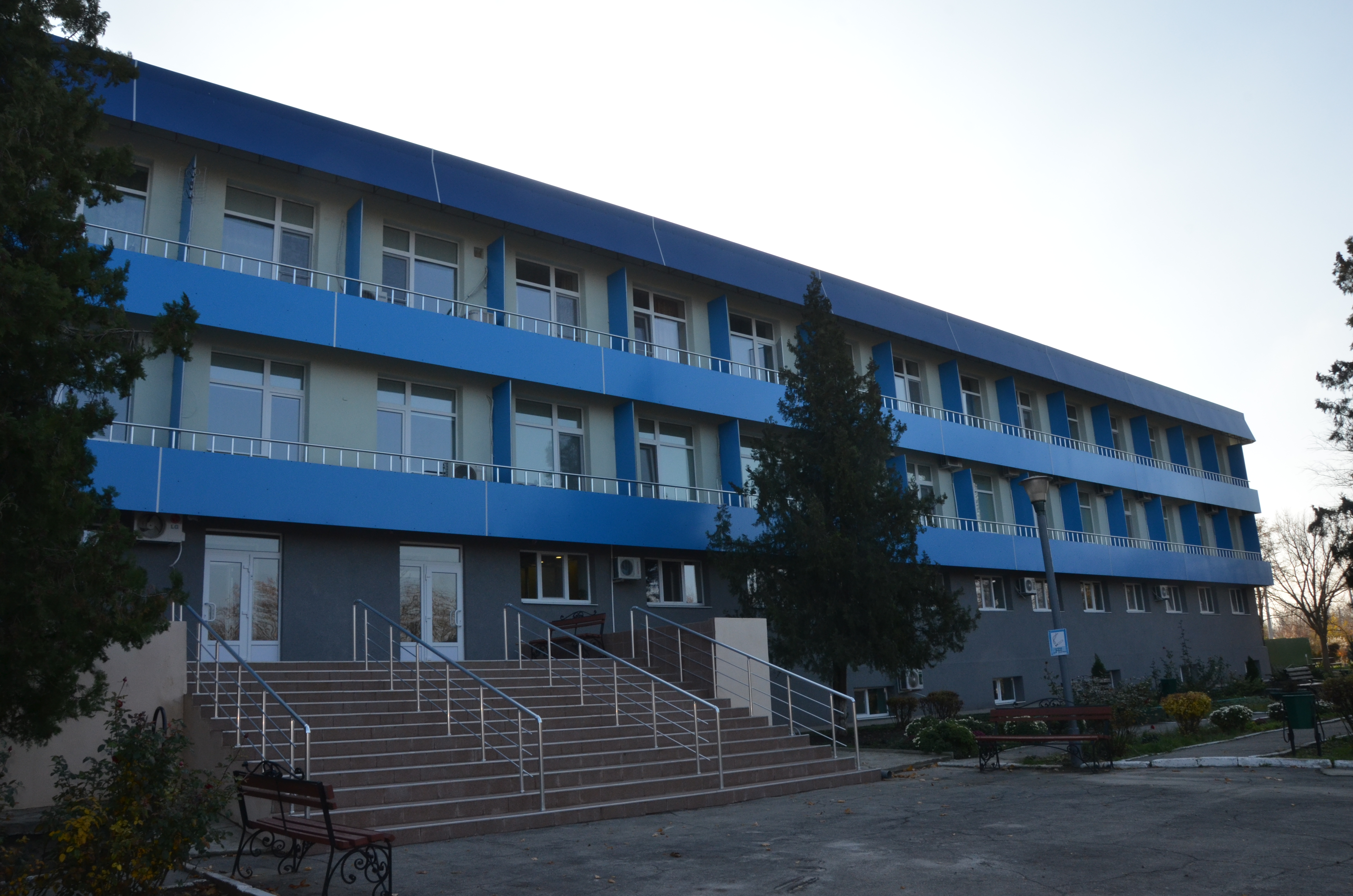 Санаторий-профилакторий "Горняк"